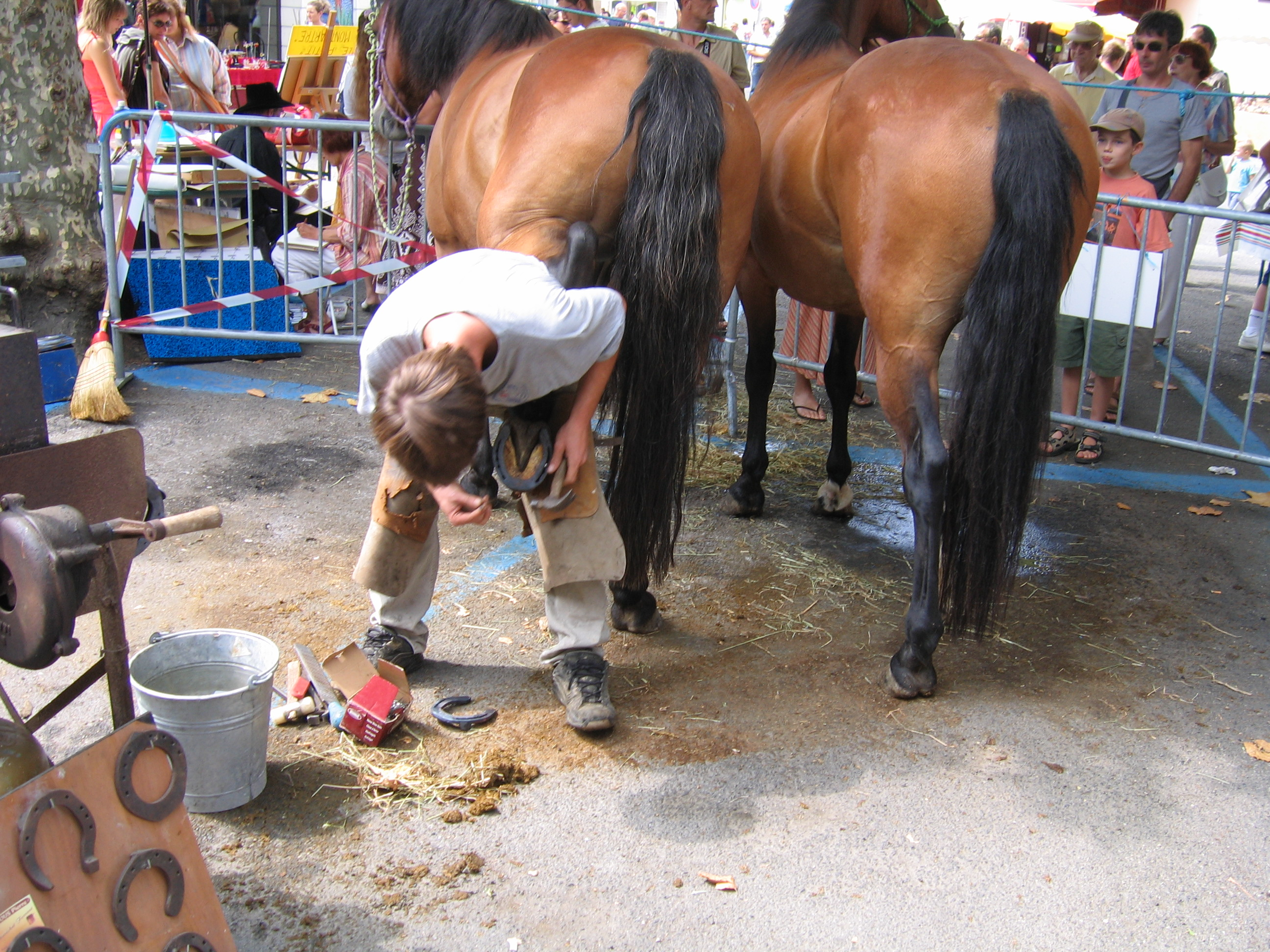 Beslaan van een paard. Eigen werk.